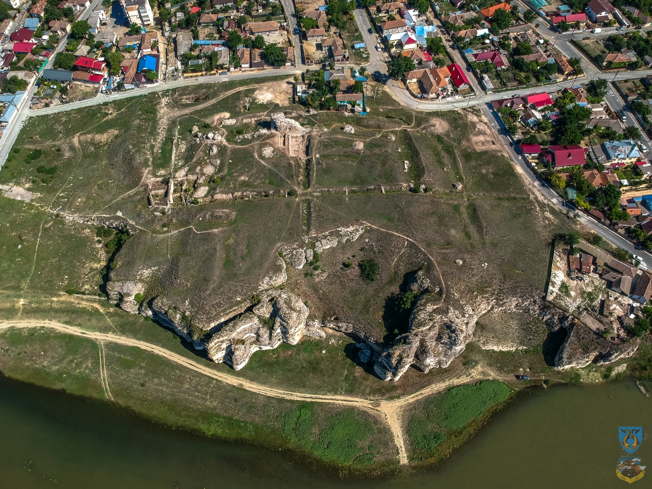 Cetatea Carsium 02